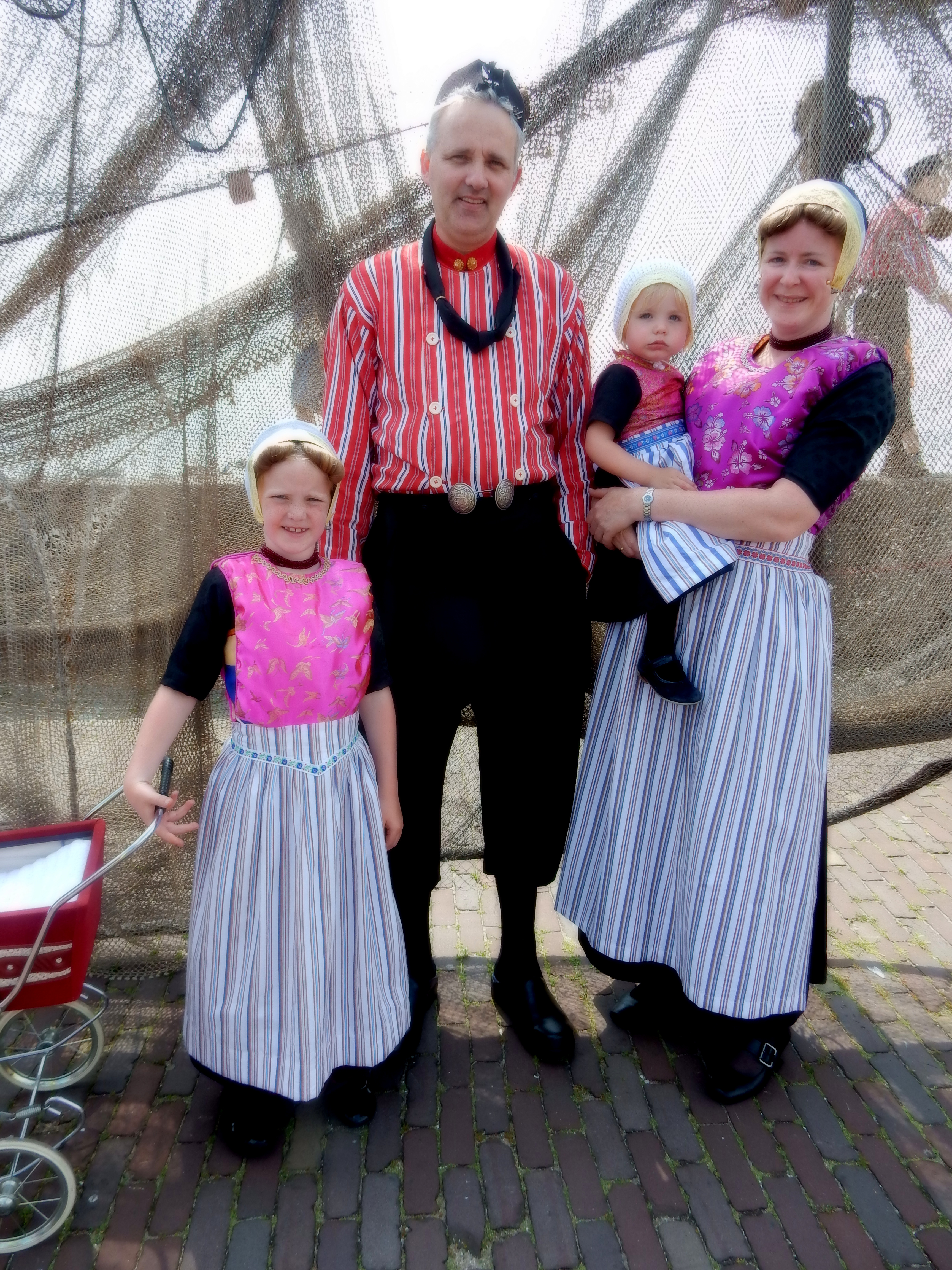 Urk - Urkerdag -3 juni 2017